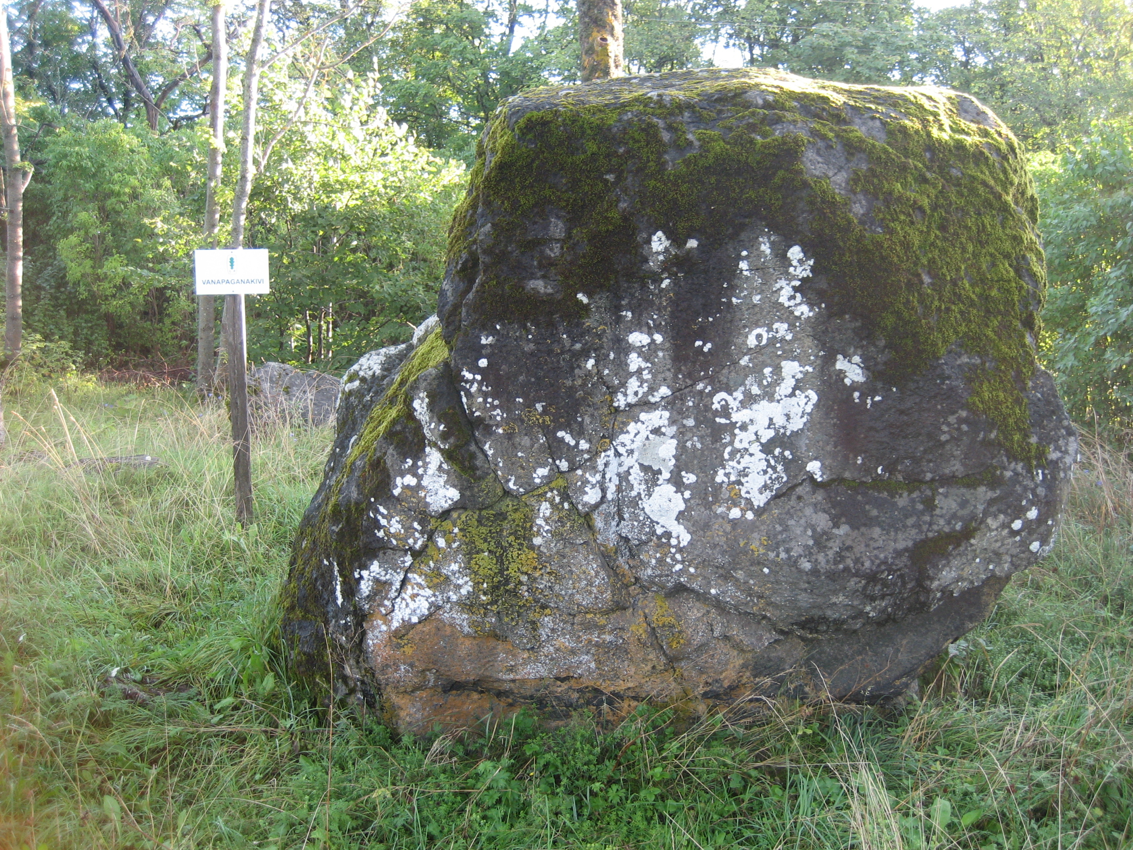 Vanapagana kivi